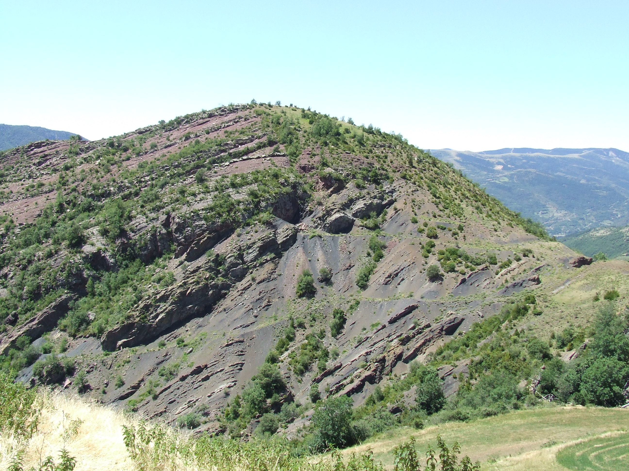 La mina de carbó d'Erillcastell (Malpàs, el Pont de Suert, Alta Ribagorça)